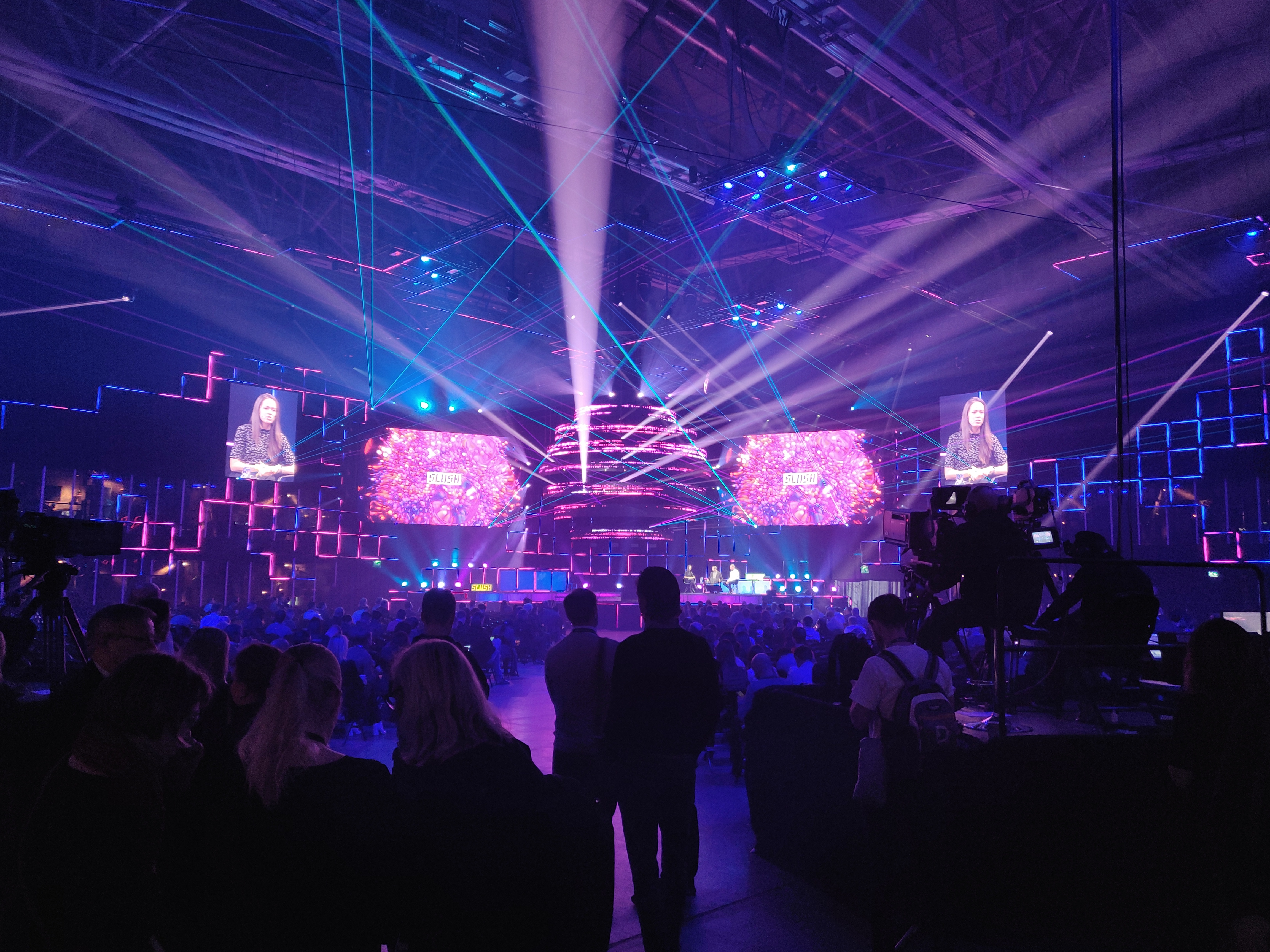 En av scenerna under Slush 2019.